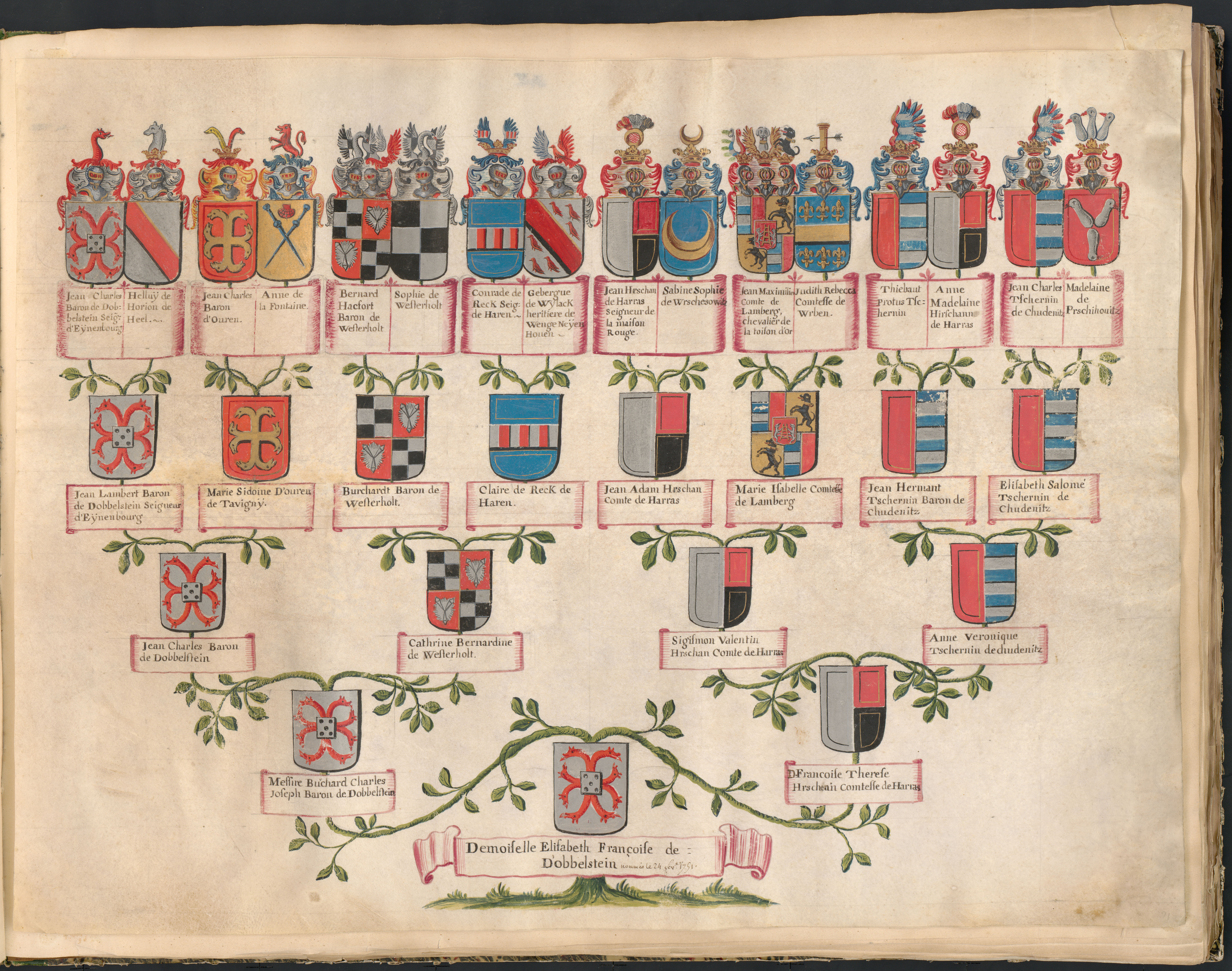 Numérisation du LV 251 (192) de la bmi Epinal